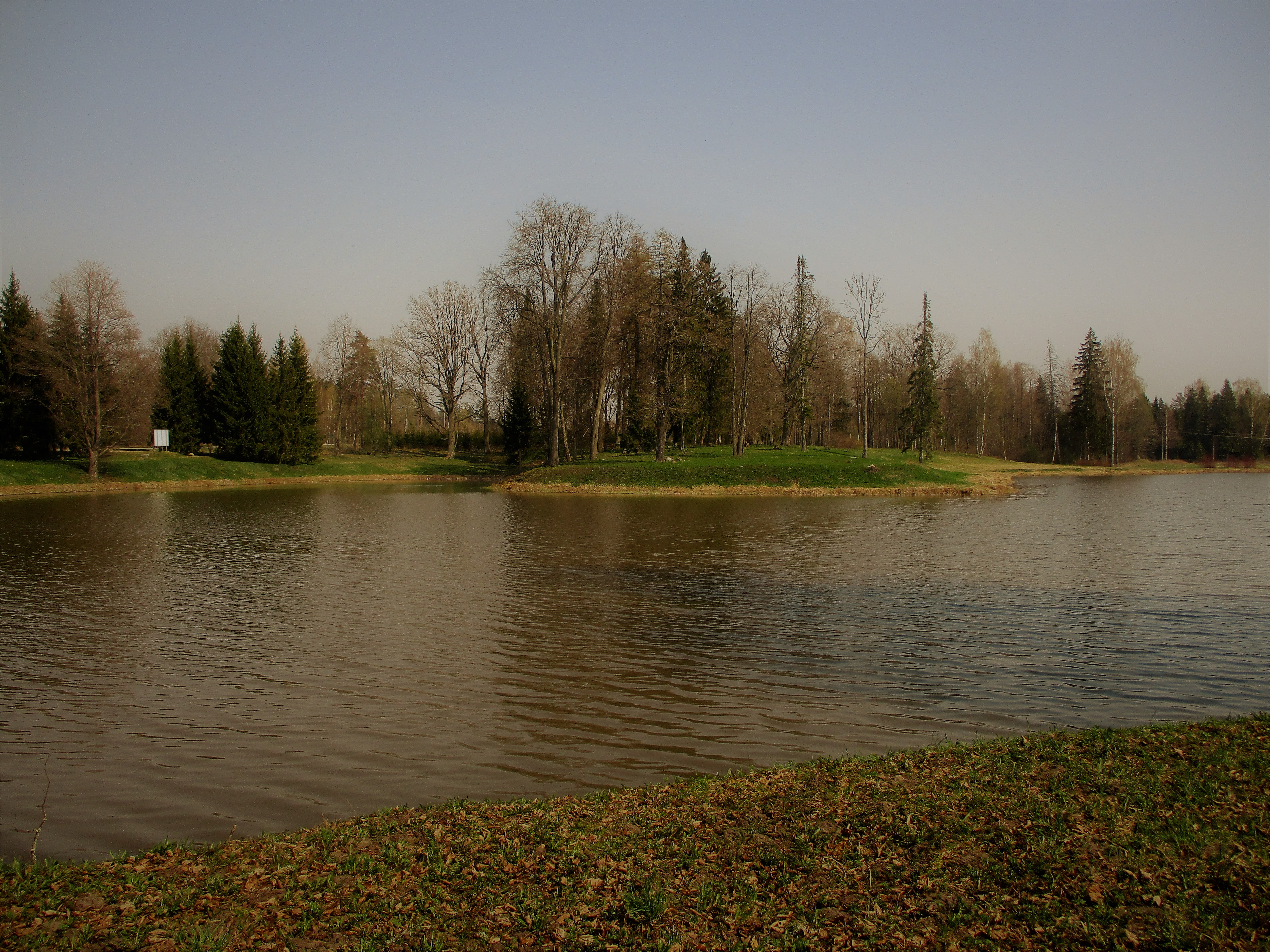 Vaade linnusealalt üle järve ida suunas.